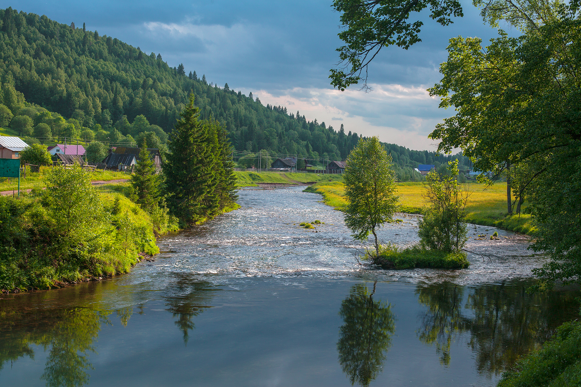 Сарвинское озеро: Нуримановский район, Башкортостан This image is related to the protected area of Russia number 0210193